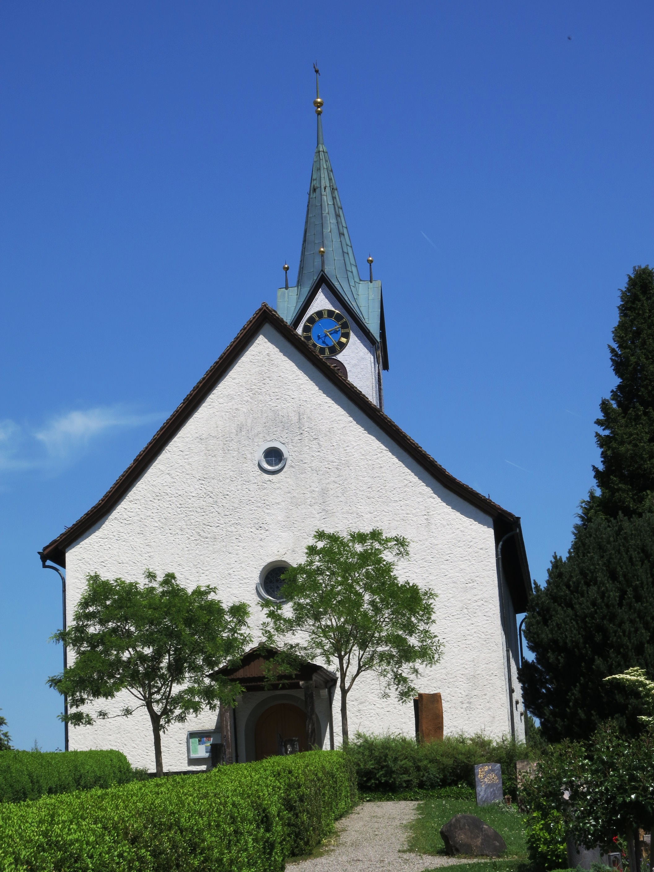 Reformerte Kirche, Langnau am Albis ZH, Schweiz